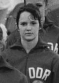 PI-Olympia-Gahlbeck-22.8.1972-ma-München: XX. Olympische Sommerspiele. Einmarsch der DDR-Turnerinnen zum öffentlichen Training in der Sporthalle des Olympiaparks in München. Irene Abel.